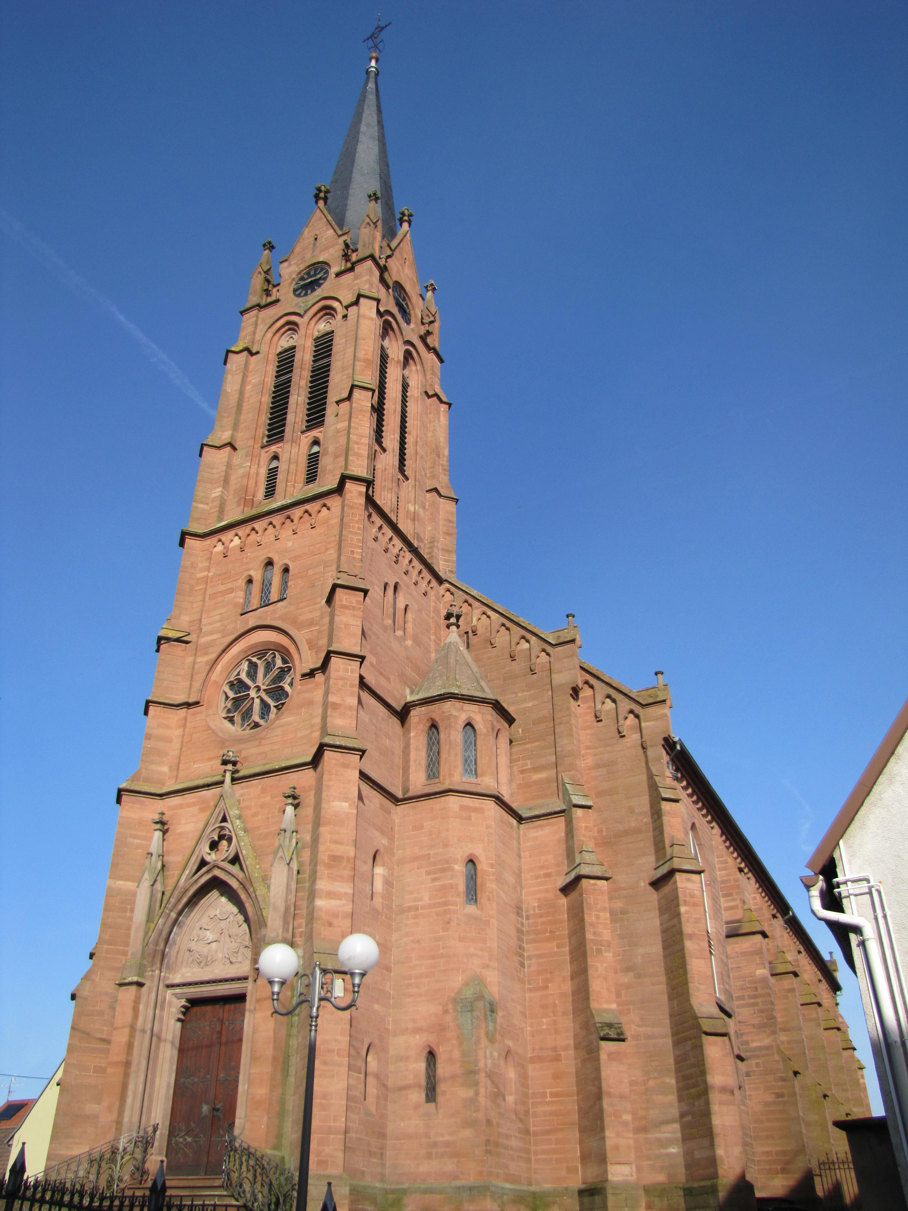 Alsace, Bas-Rhin, Steinbourg, Église Saints-Pierre-et-Paul (IA00055522).